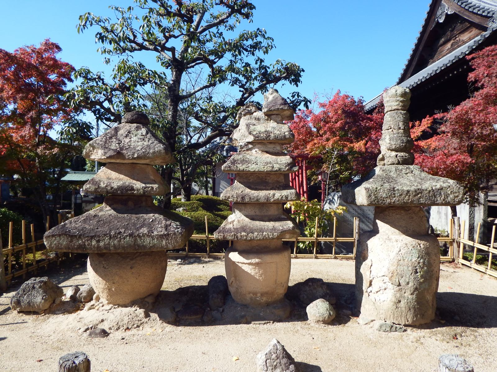 一宮寺の一宮御陵